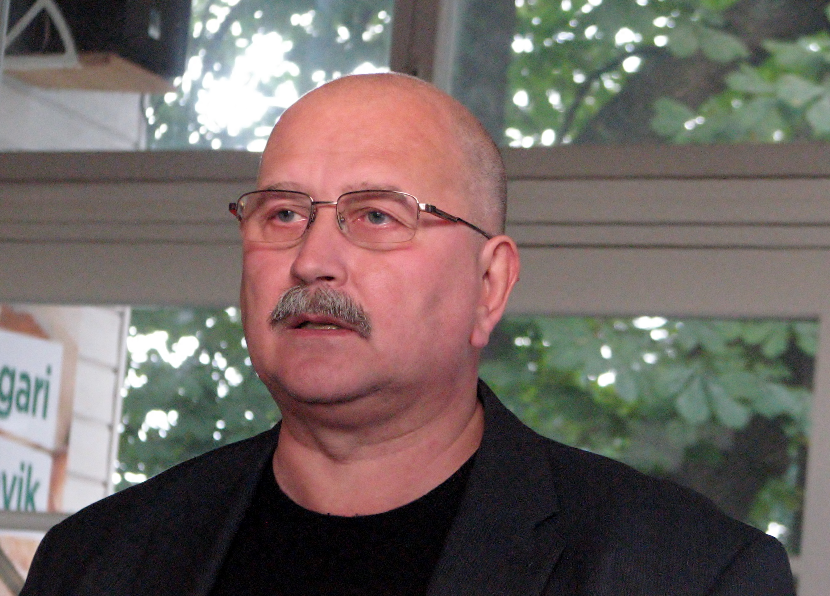 Kalle Klandorf esinemas Edgari kohvikus